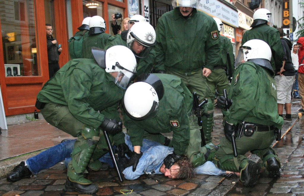 Hamburger Polizeibeamte bei einer FestnahmeHamburg 28. Mai 2007